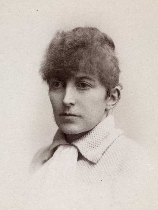 Thora Hansson fotografert av Louise Abel, portrett, kvinne, skuespillerinne, vignettert brystbilde.